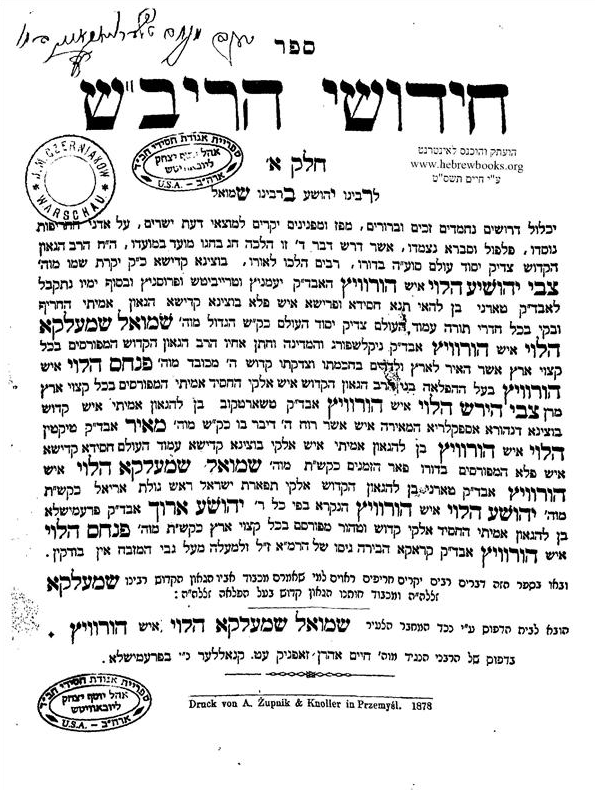 Titulní stránka Chiduši Hariboš, 1878, Přemyšl